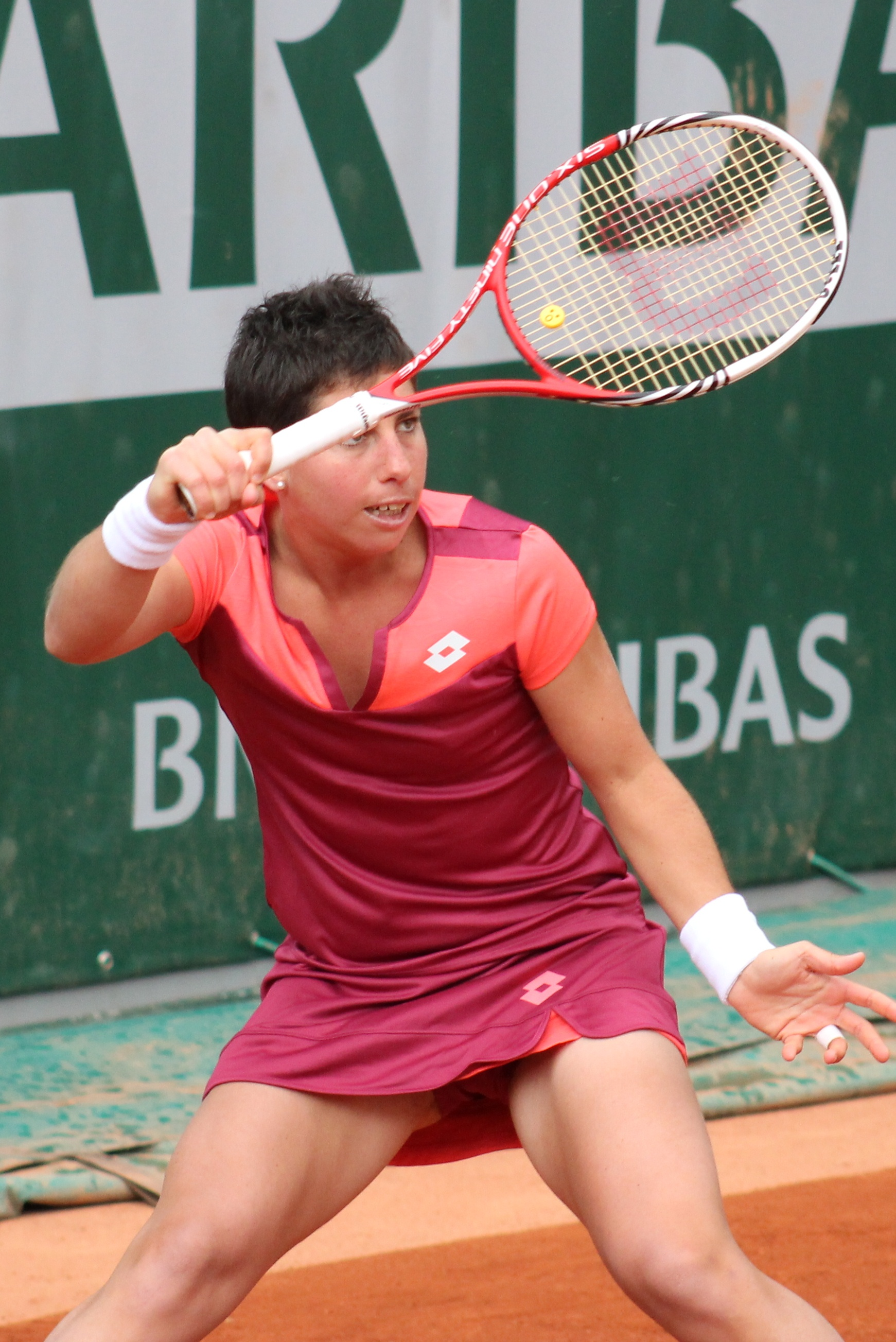 Suarez Navarro RG13 (14)